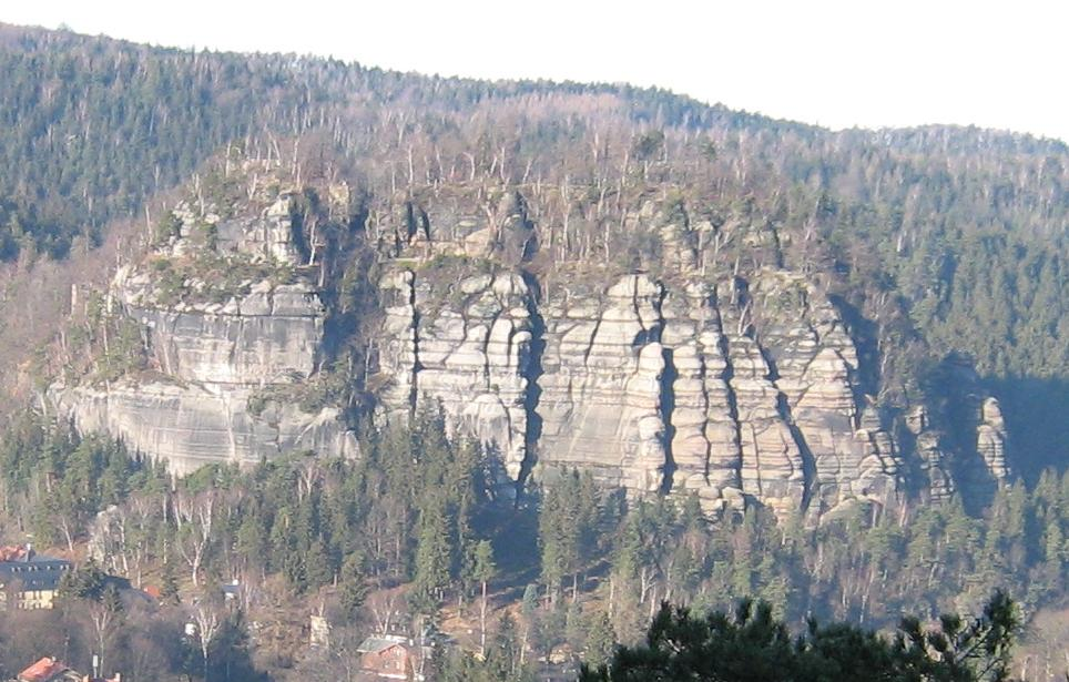 Der Berg Oybin im Zittauer Gebirge